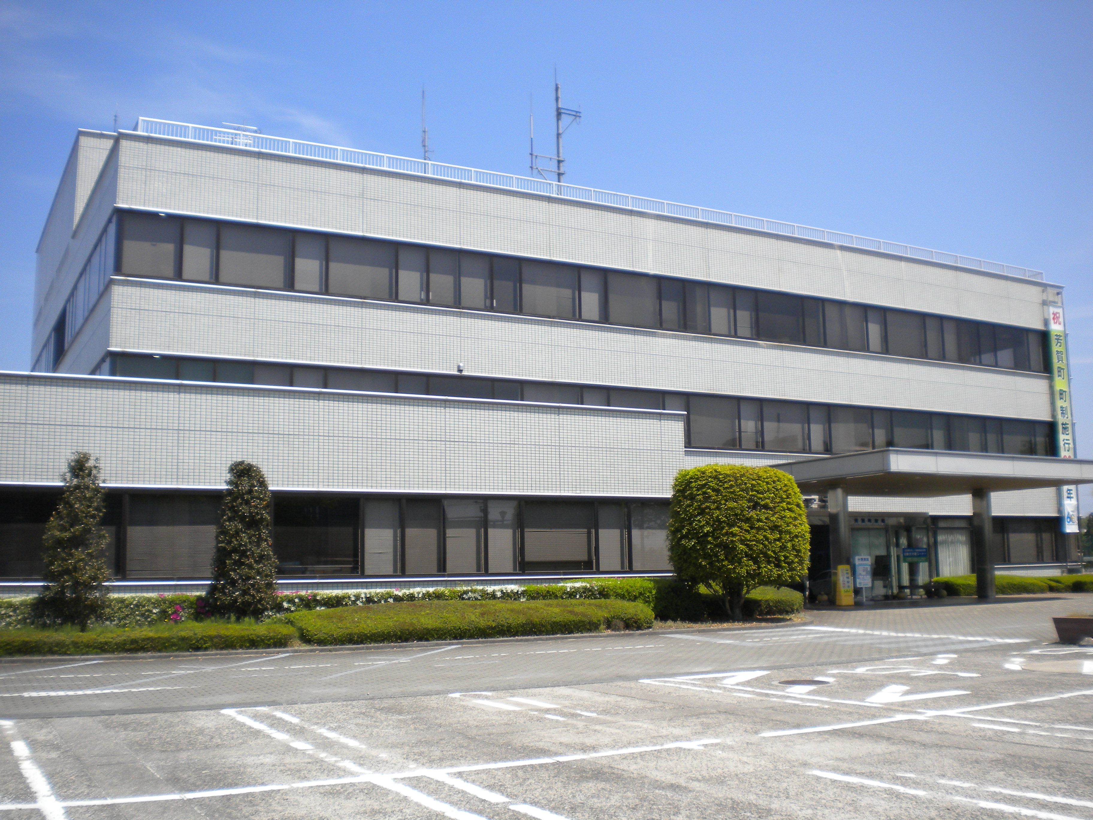 芳賀町役場 栃木県芳賀郡芳賀町大字祖母井 投稿者撮影